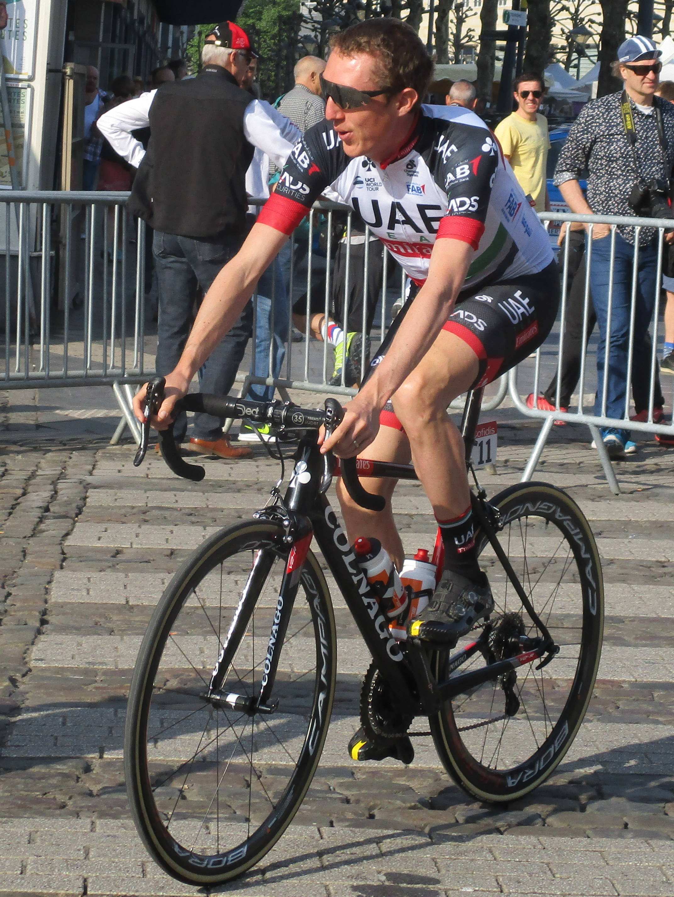 Start van Luik-Bastenaken-Luik 2018 in Luik.